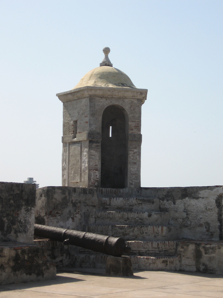 Garita Castillo San Felipe, Cartagena